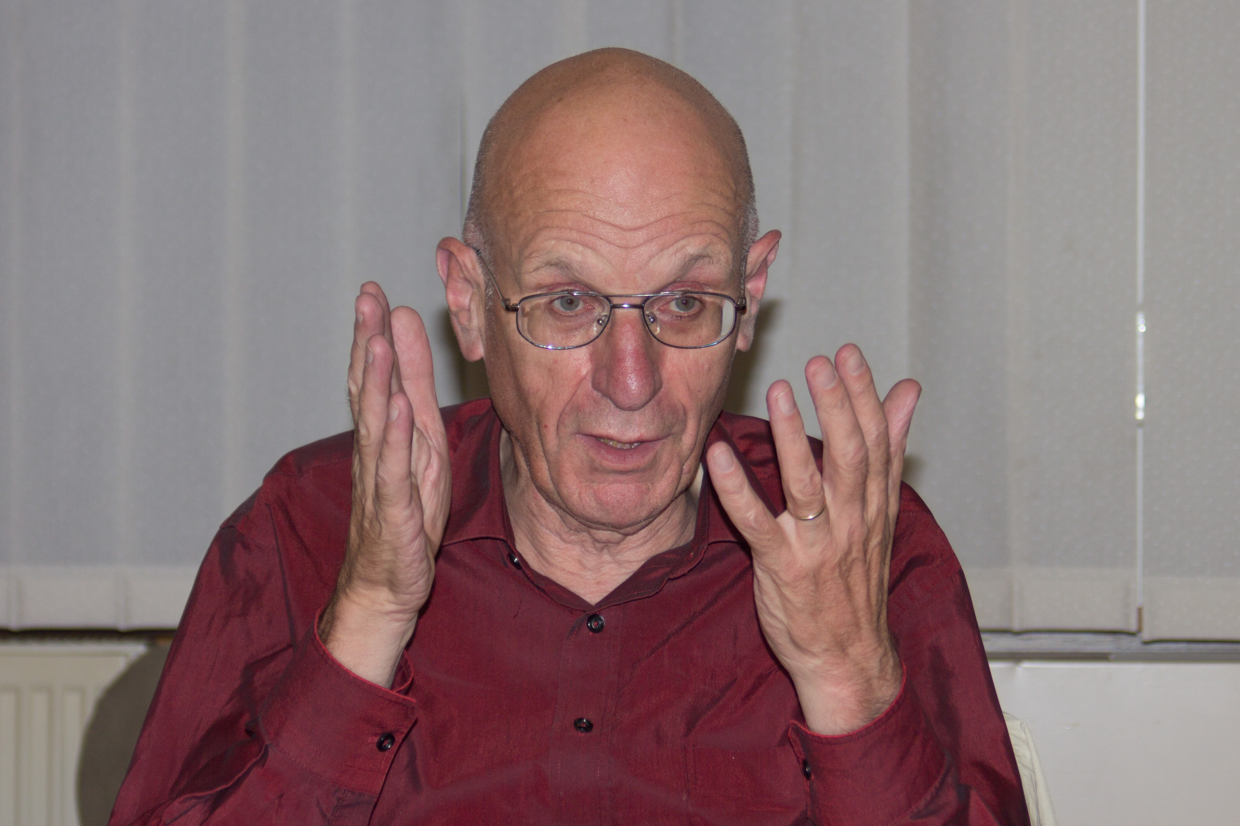 Georg Fülberth (* 25. September 1939 in Darmstadt), deutscher Politikwissenschaftler und Politiker (bis 1966 Mitglied der SPD, seit 1974 der DKP).